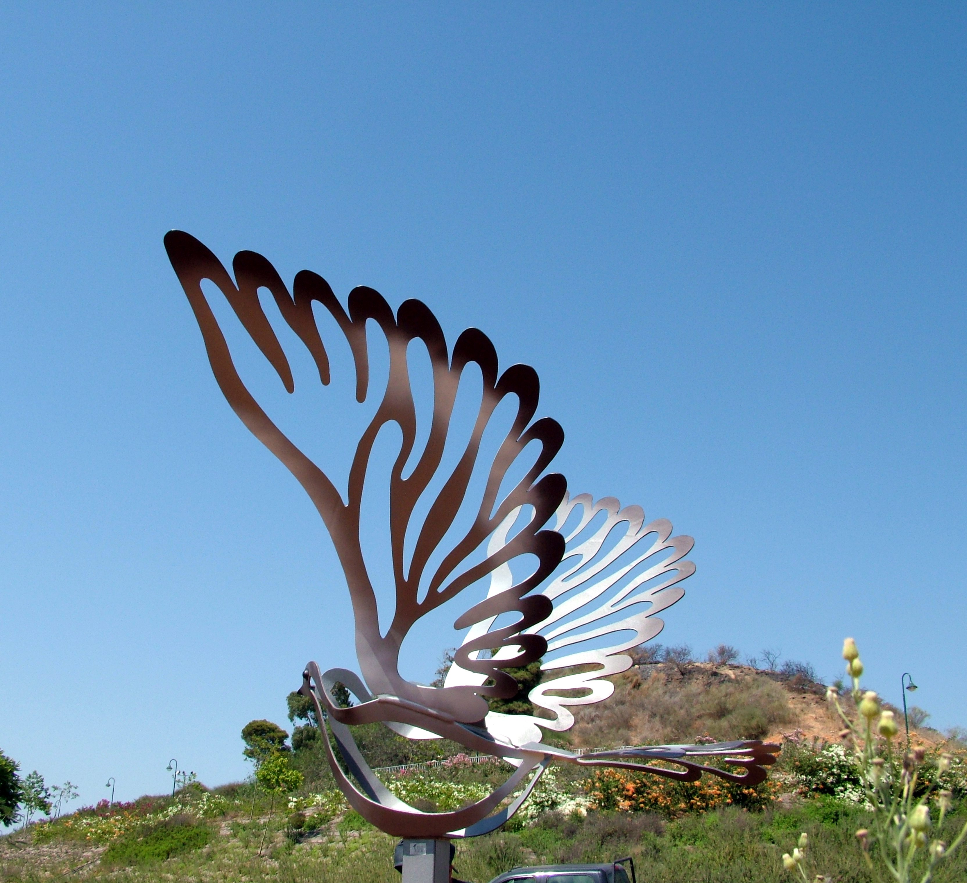 פסל: ישראל פרימו. עבודת ברזל בנפחים. 250 ס"מ